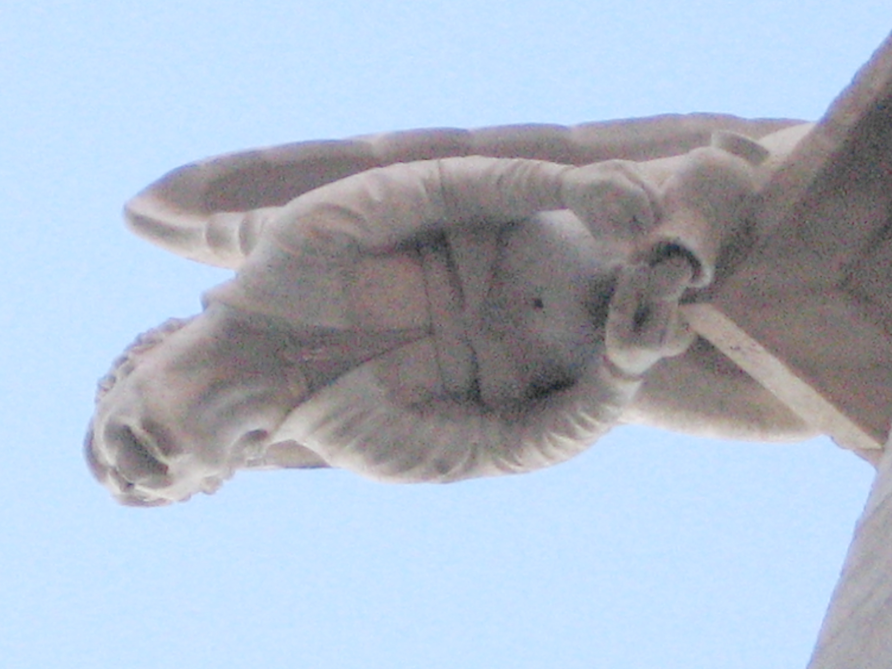 Gàrgola en un angle del mur de la Llotja de la Seda de València